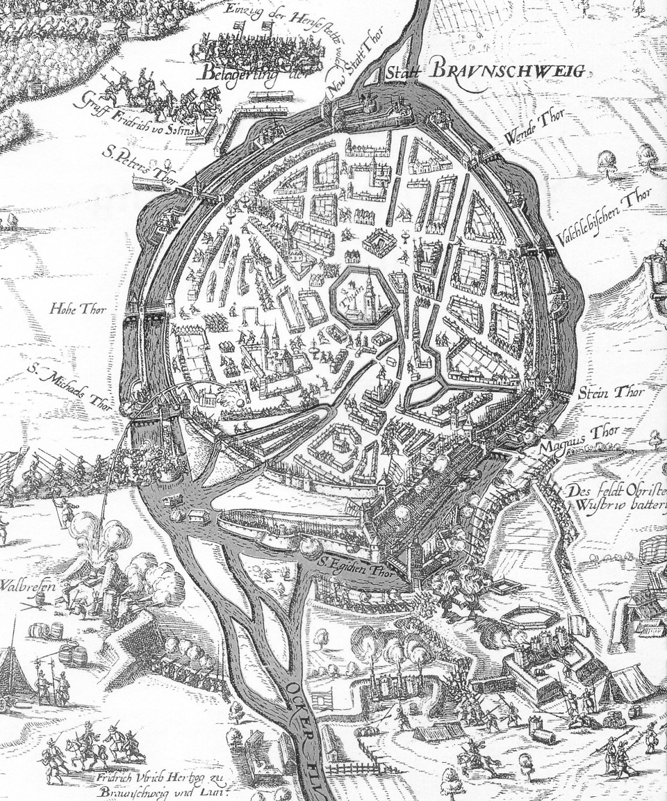 Belagerung von Braunschweig 1615, Bildausschnitt